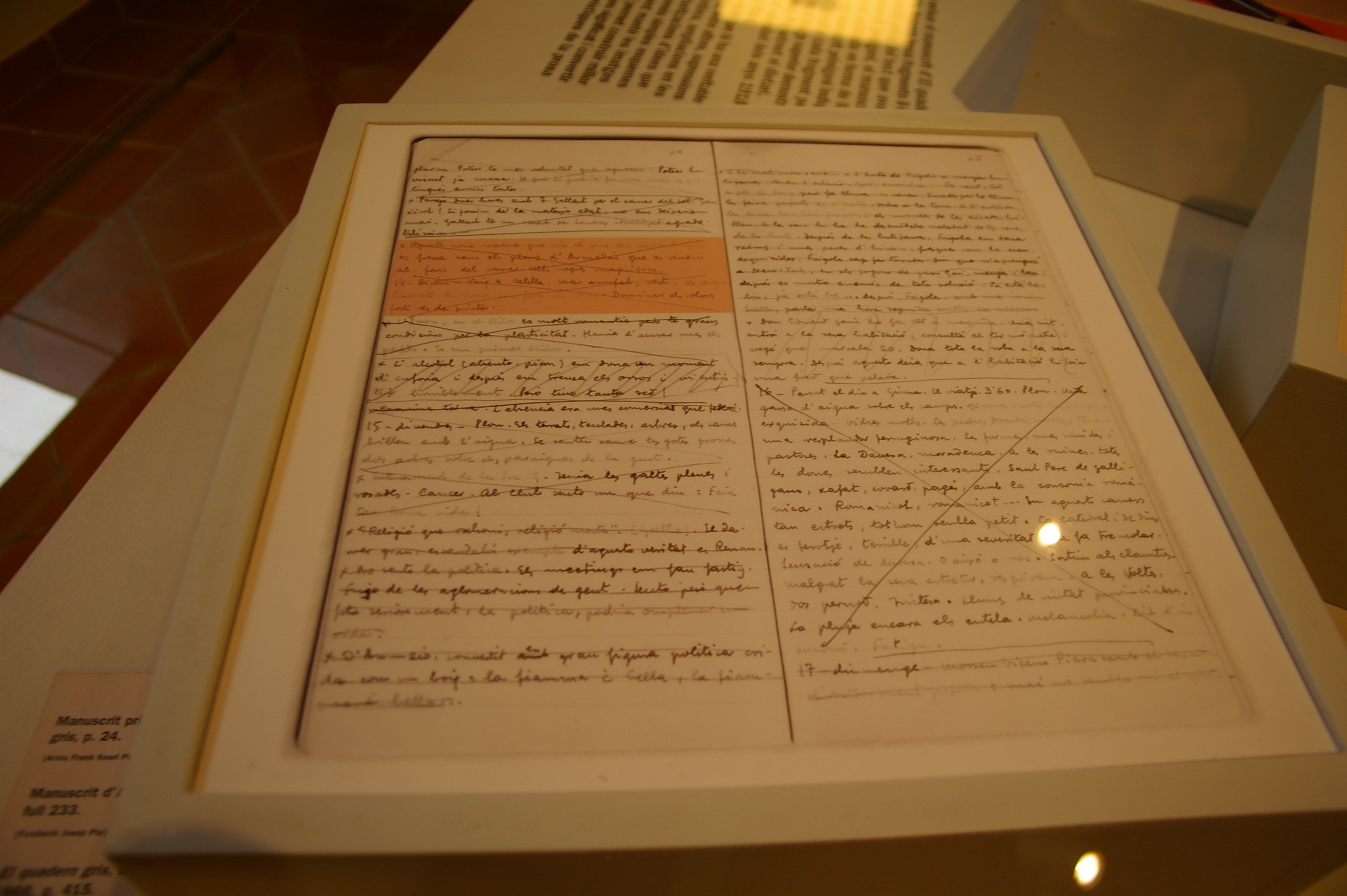 Manuscrito de El Quadern gris, de Josep Pla. Forma parte de la exposición permanente de la Fundació Josep Pla de Palafrugell.